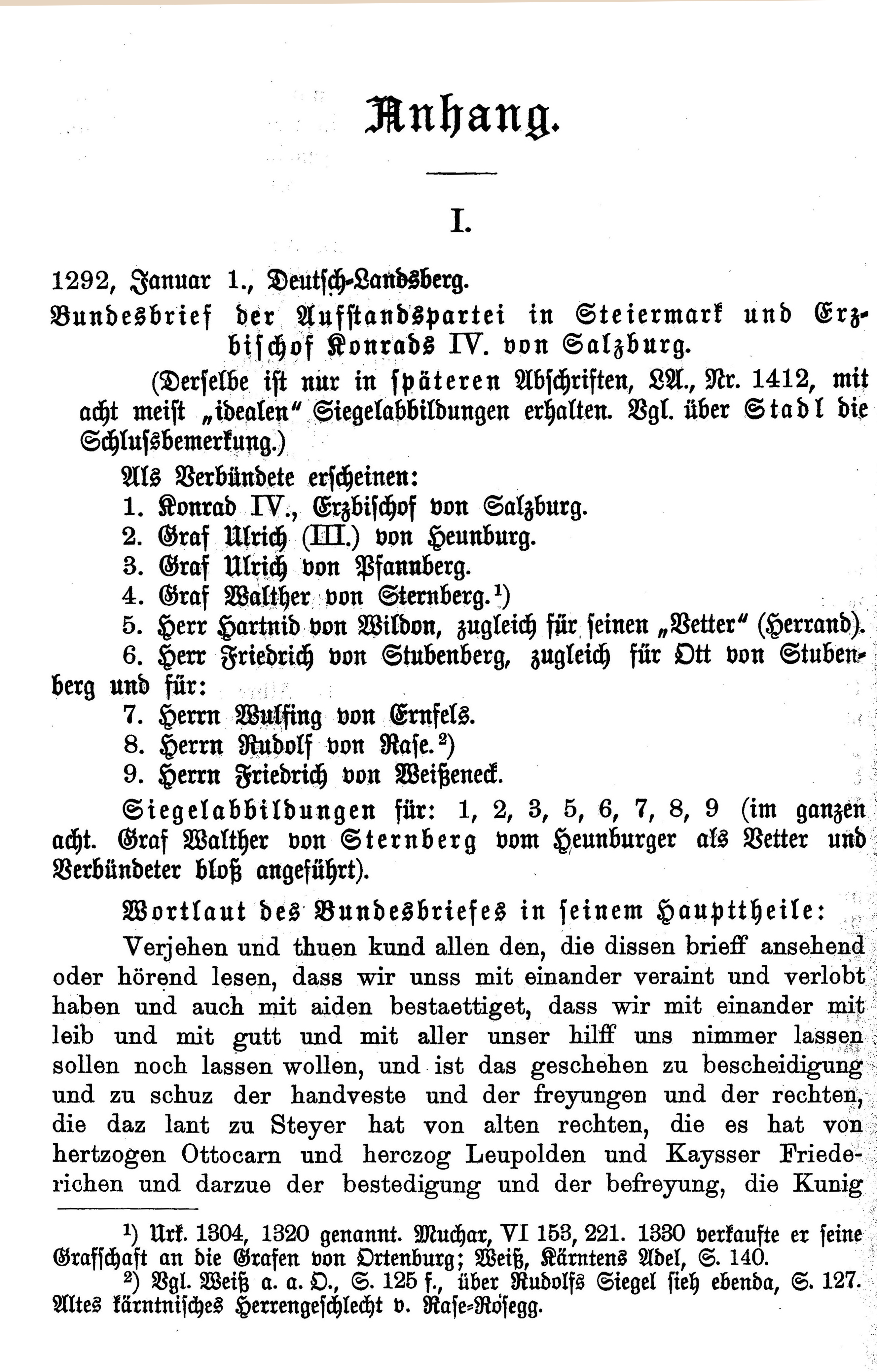 Abschrift der Urkundes des Landsberger Bundes aus dem Jahr 1292, einer Verschwörung von Adeligen in der Steiermark gegen Albrecht I. von Habsburg. Kopie aus: Franz Xaver von Krones (1835-1902): Landesfürst, Behörden und Stände des Herzogthums Steier 1283–1411. Verlag Styria Graz 1900. Seite 228.